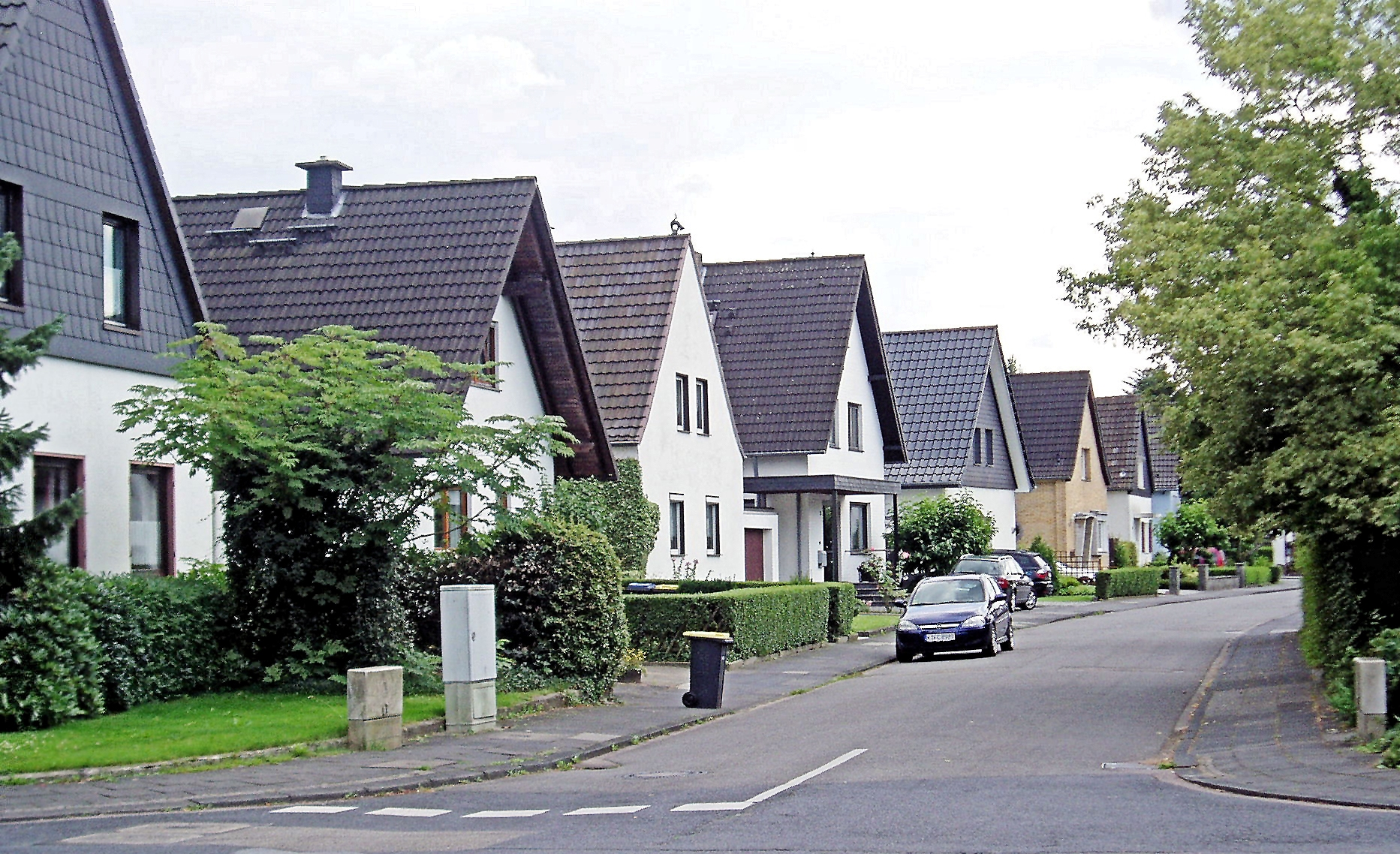 Badener Viertel, Konstanzer Straße in Köln-Ostheim